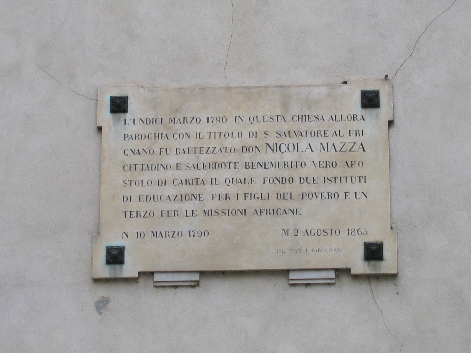 Lapide posta sulla chiesa nella quale venne battezzato don Nicola Mazza, a Verona